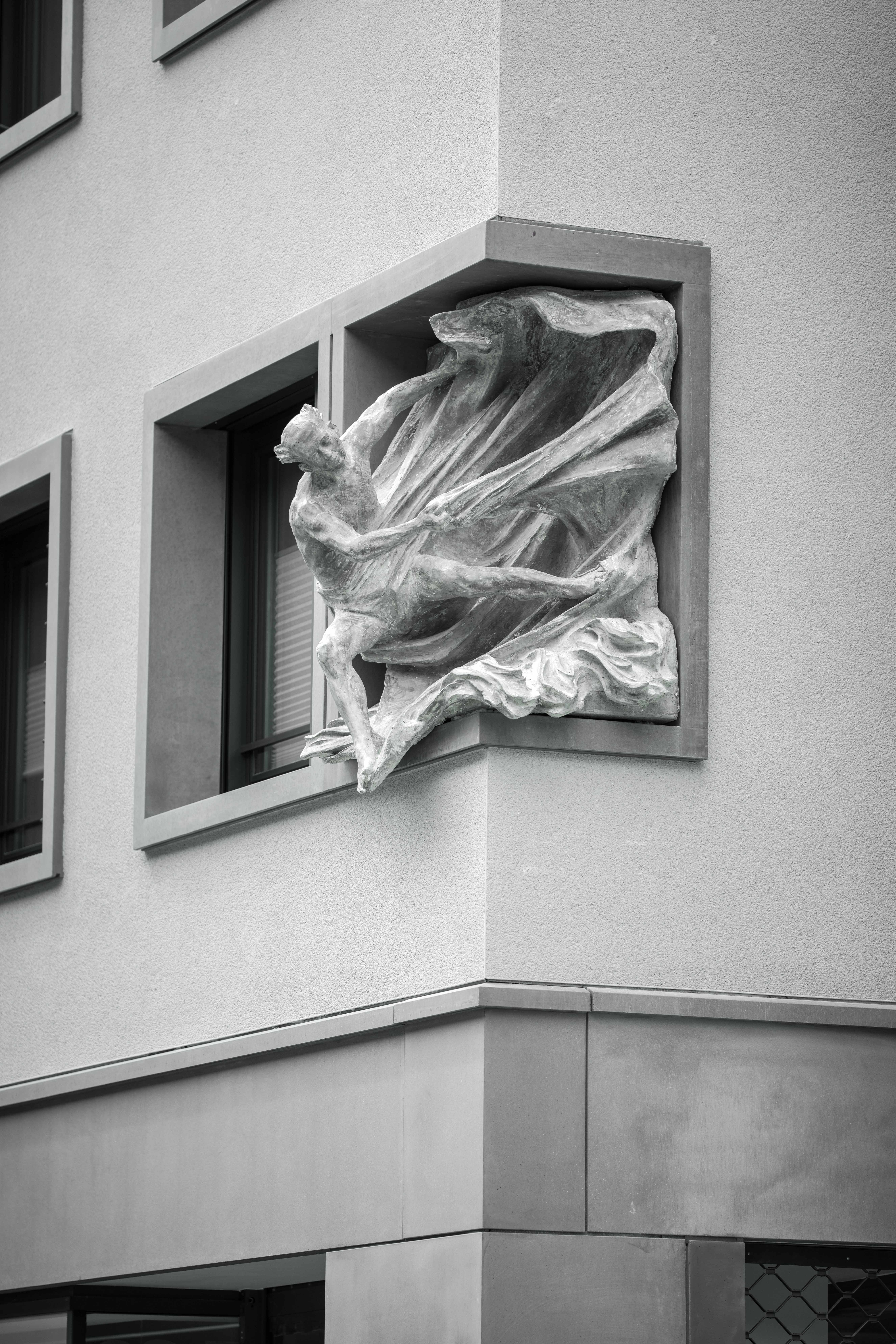 Die Plastik von Raimund von Penyafort wurde von dem Bildhauer Wolfgang Eckert geschaffen und 2018 am neu gebauten Offizialat der Erzdiözese Freiburg angebracht.